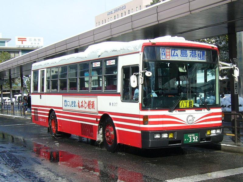 登録番号 広島200か・392 広島バス所属 2005年12月18日 広島駅前にて撮影